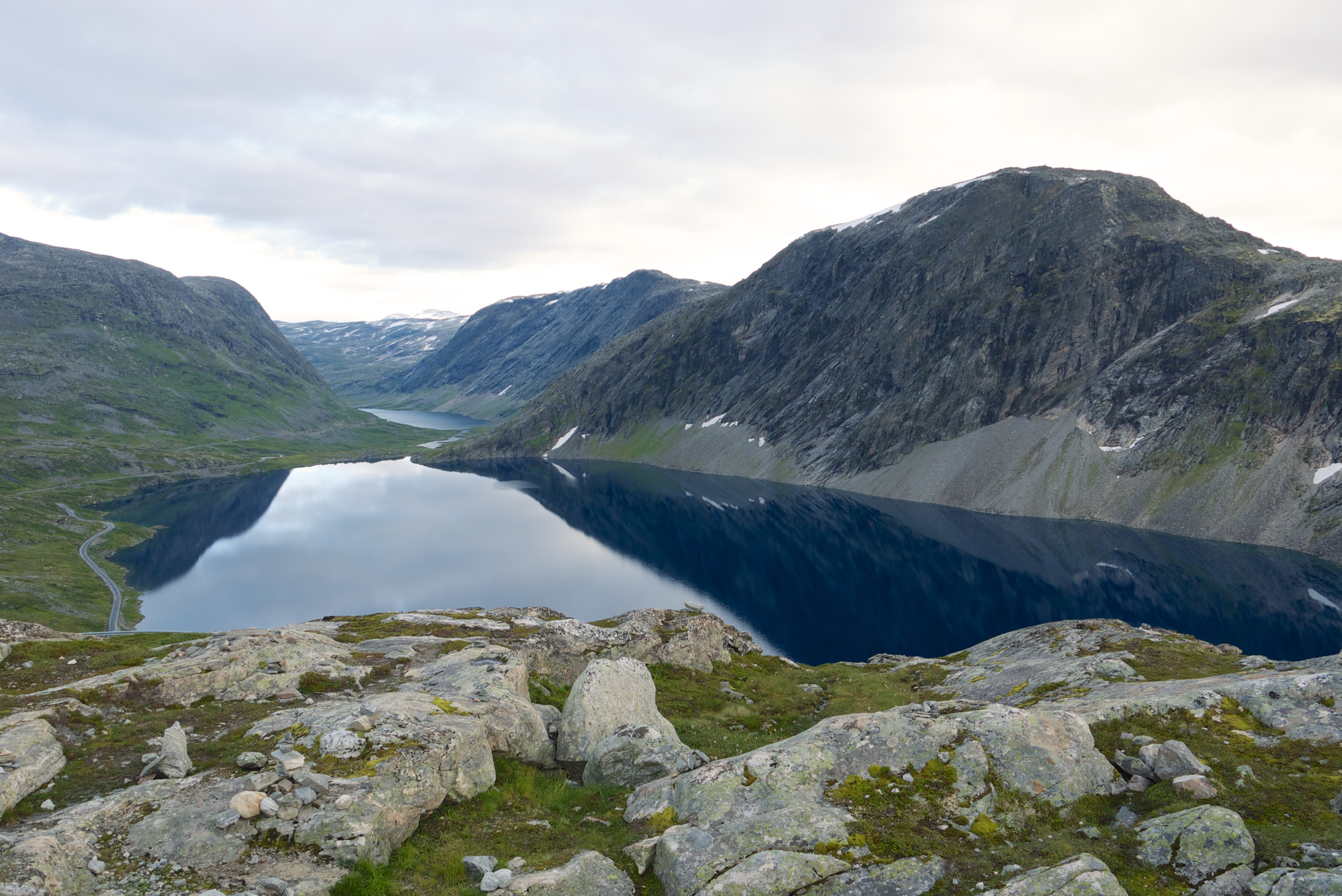 Djupvatnet